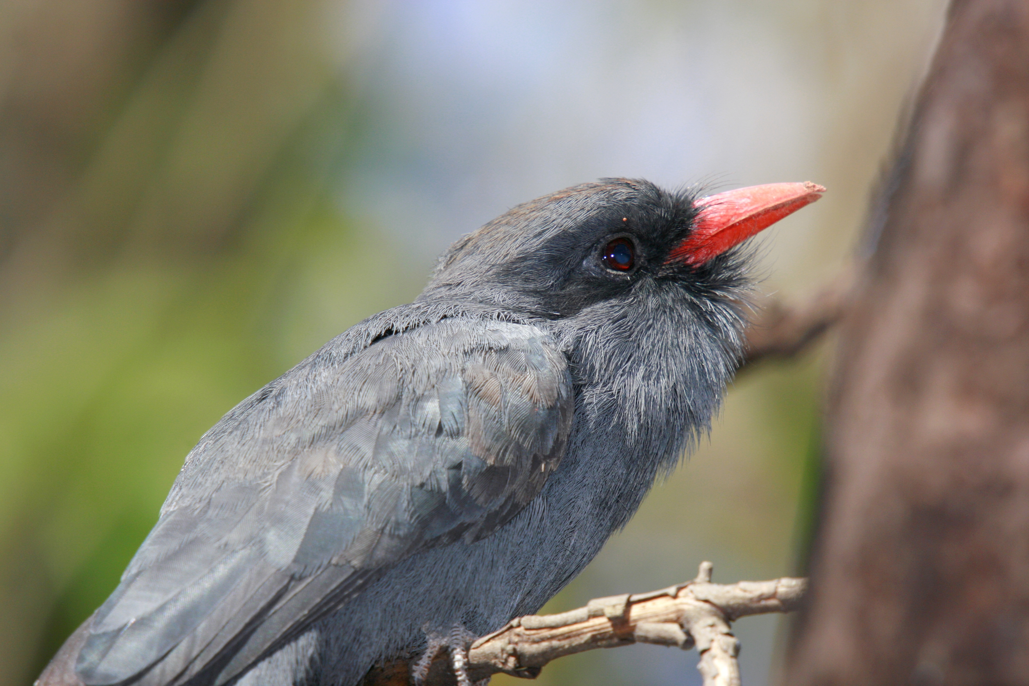 Close de um Chora Chuva Preto ,Black-fronted Nunbird, Monasa nigrifrons